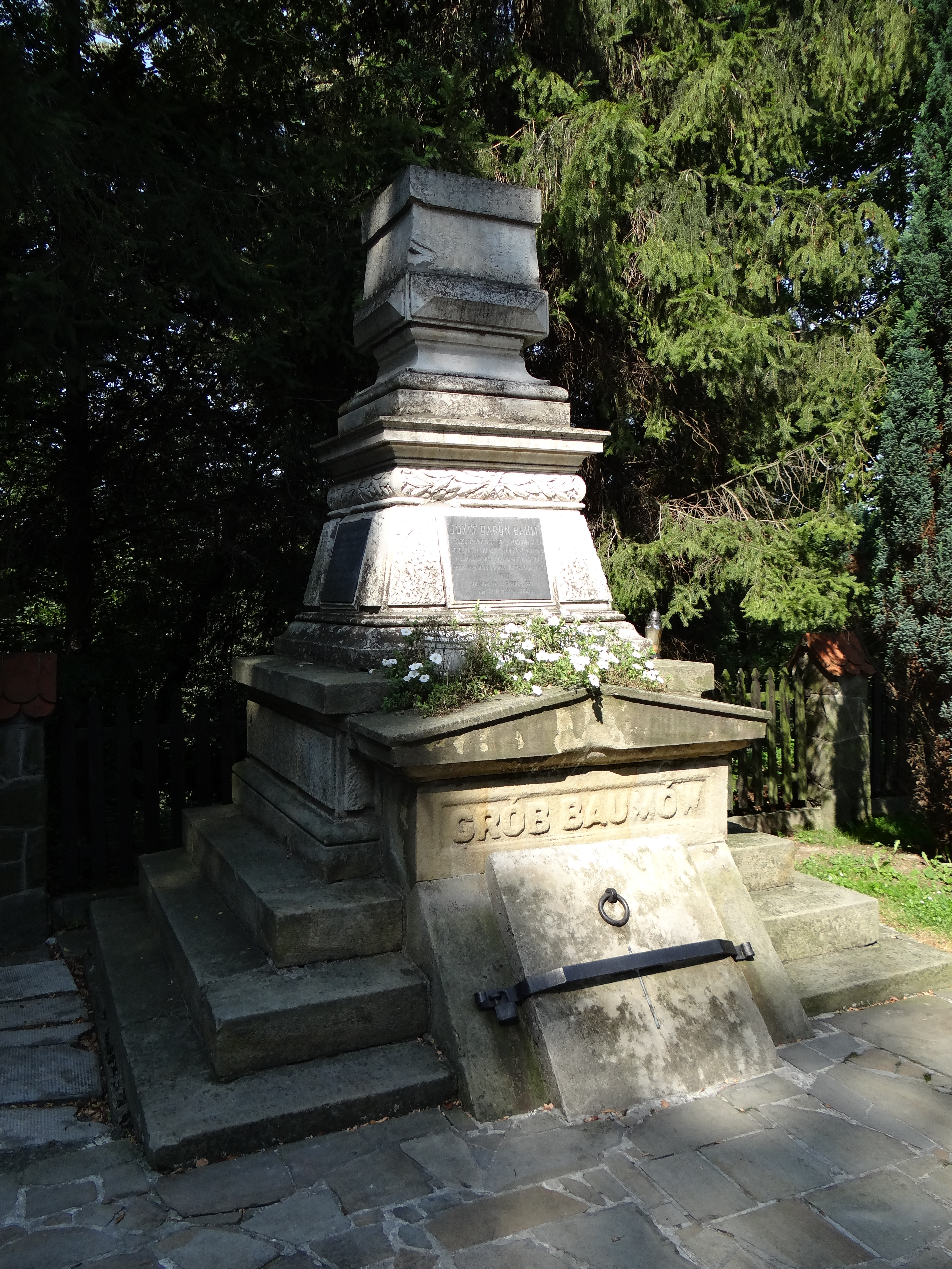 Kościół św. Marcina w Marcyporębie. Gmina Brzeźnica. Grobowiec Baumów.